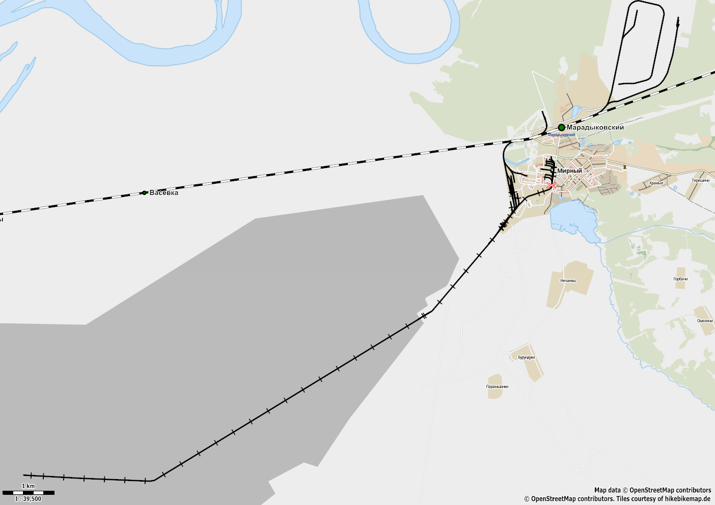 Карта УЖД Пищальского торфопредприятия. This map may be incomplete, and may contain errors. Don't rely solely on it for navigation. Border coordinates58.334239888258548.6895741585703←↕→48.448561585328158.2447317978815